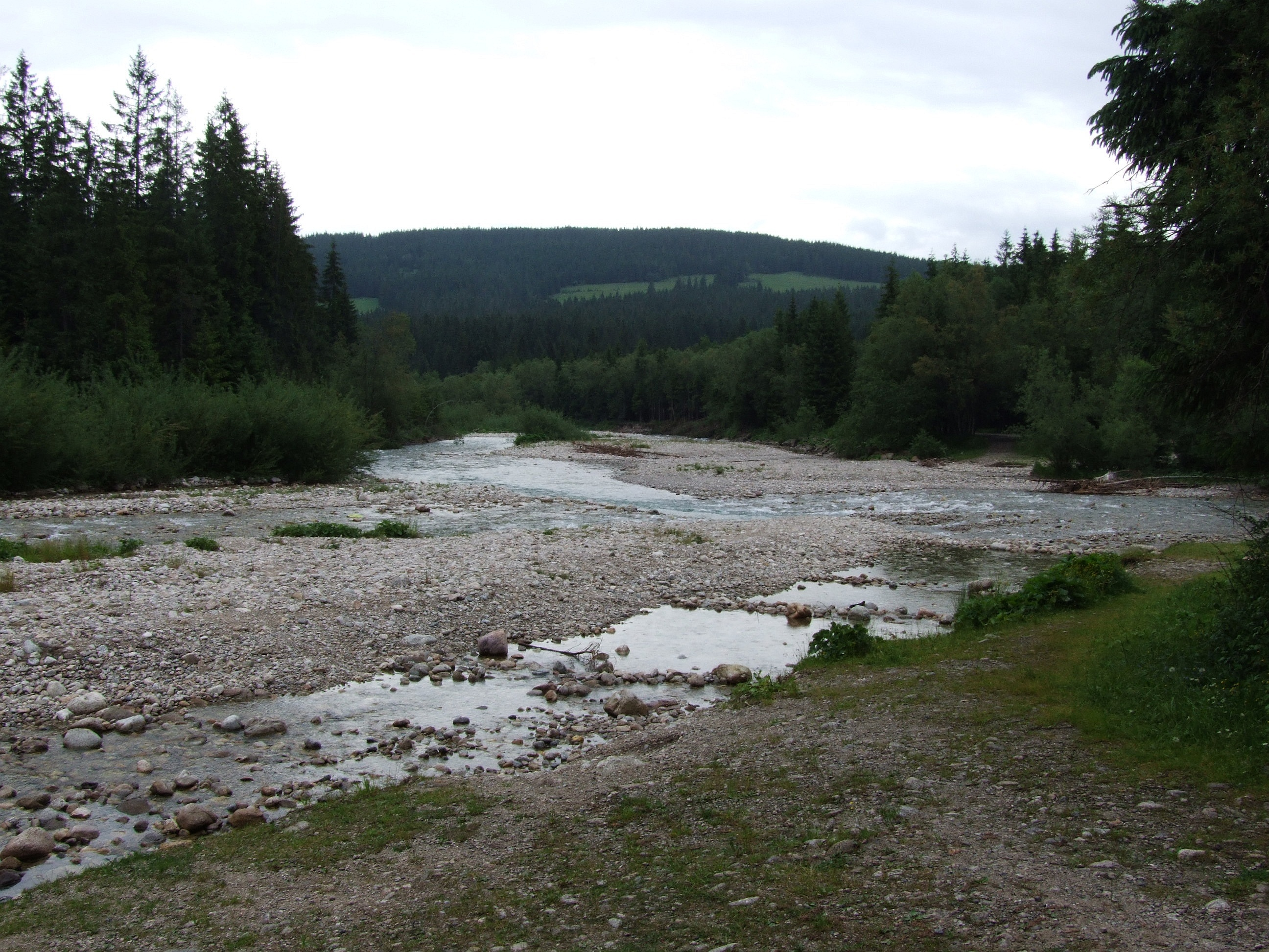 Miejsce powstawania Czarnego Dunajca: połączenie się Siwej Wody z Kirową Wodą w Roztokach